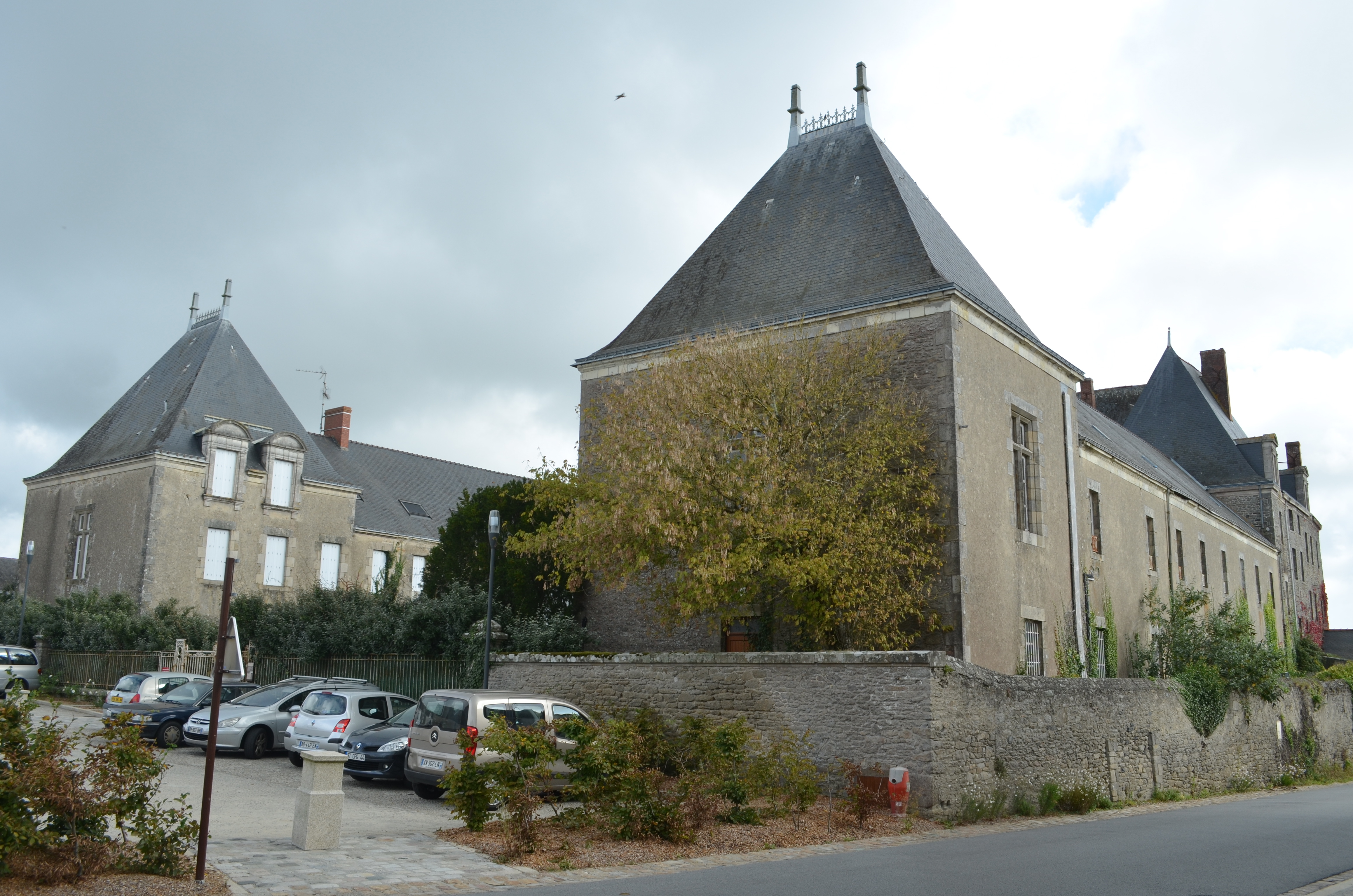 Couvent des Ursulines, actuellement désaffecté - Guérande (Loire-Atlantique)